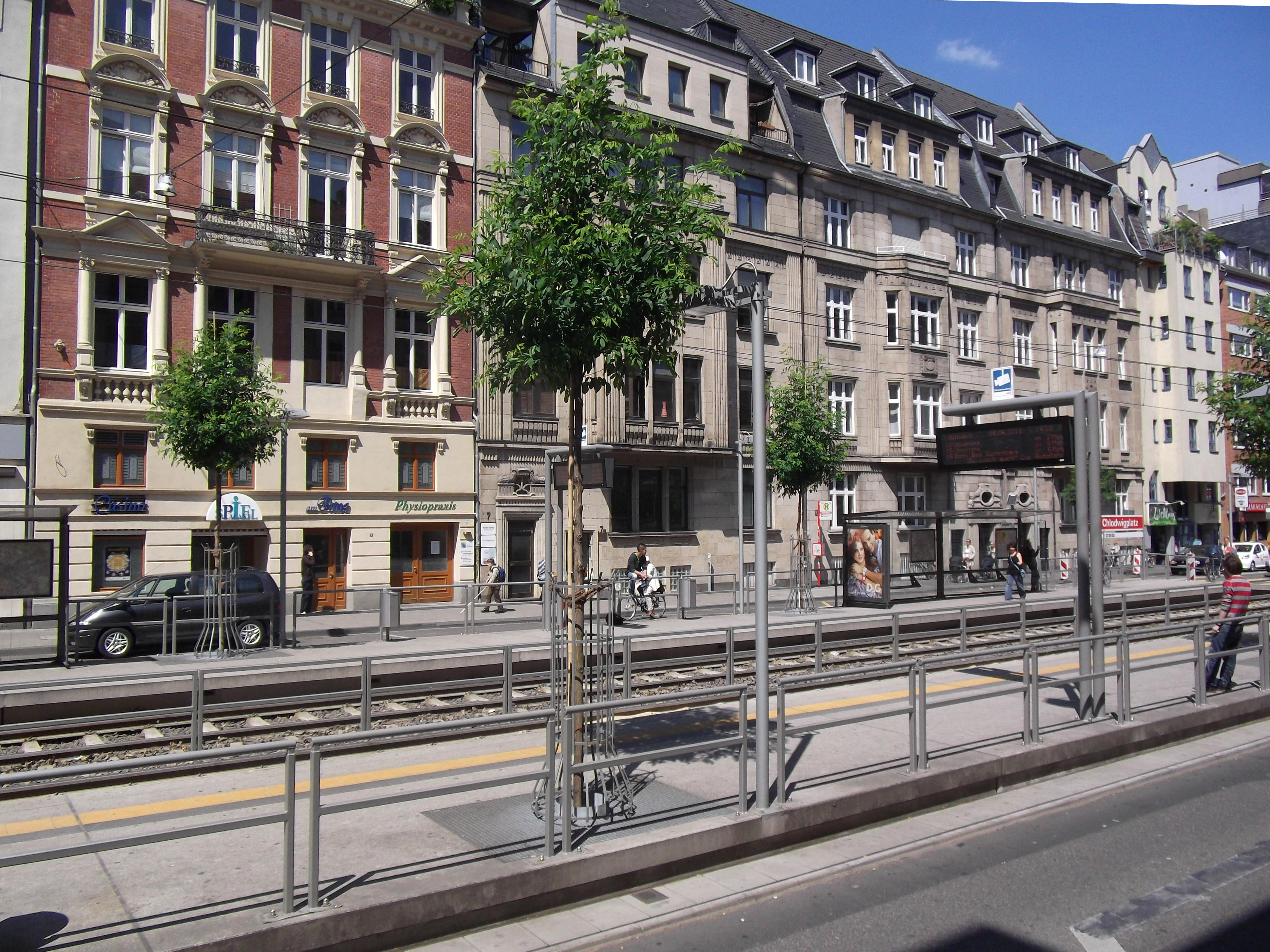 Cologne (Köln); Germany: Köln-Altstadt-Süd: Chlodwigplatz KVB station